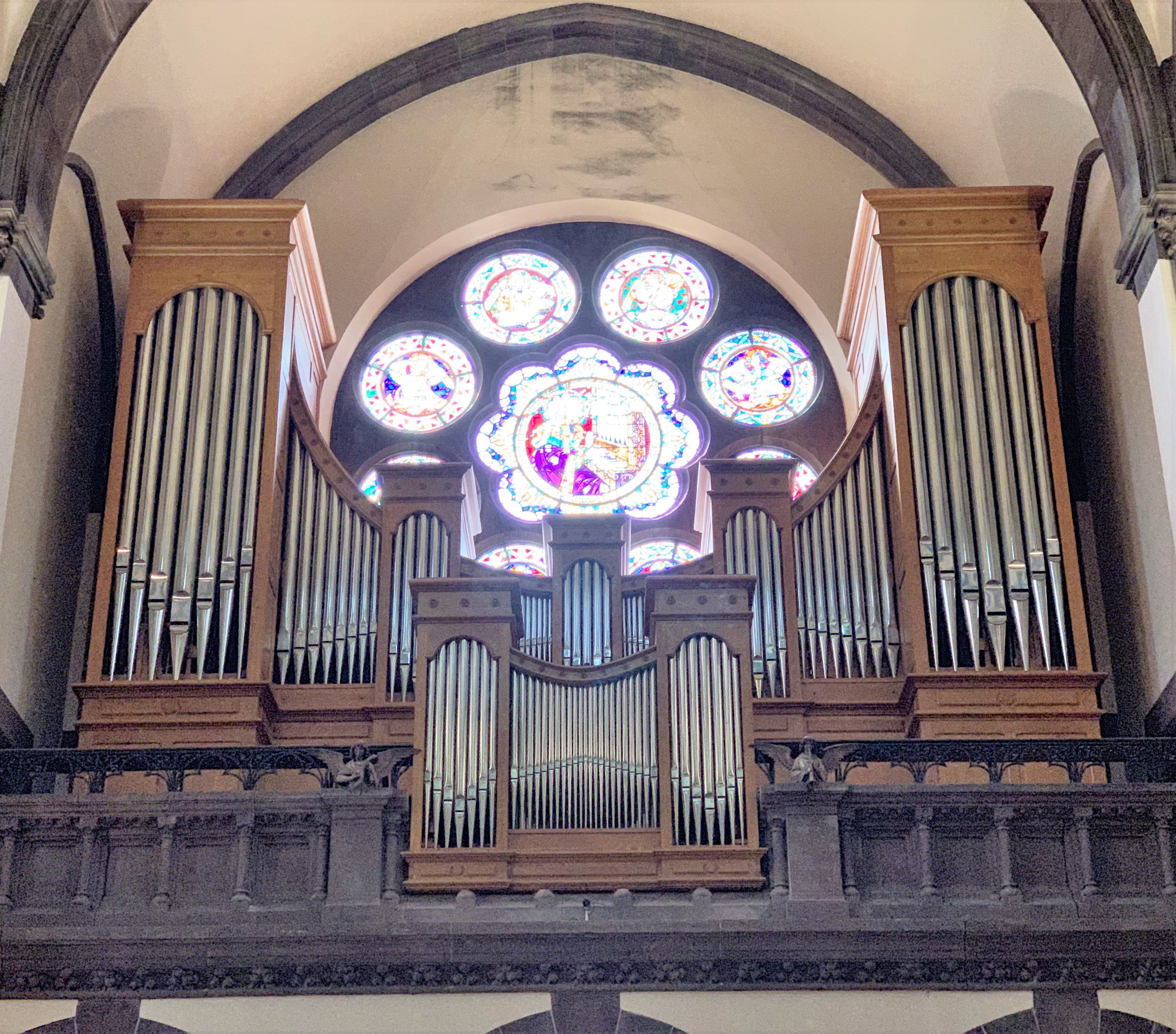 Intérieur de l'église catholique Saint-Pierre-le-Jeune de Strasbourg.